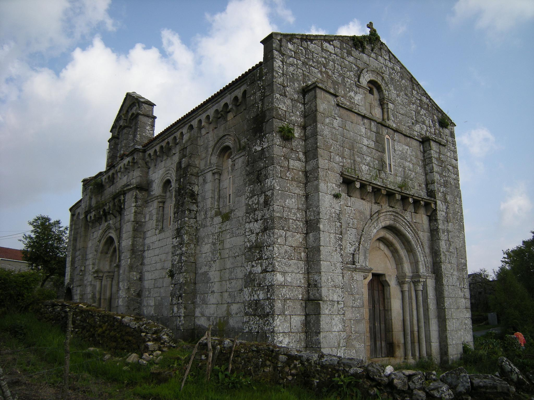 Iglesia de San Pedro de Vilanova de Dozón. Iglesia románica edificada en el año 1154. Formó parte de un antiguo monasterio de monjas benedictinas. Es de nave única con planta rectangular y ábside semicircular. (Dozón, Galicia, España.